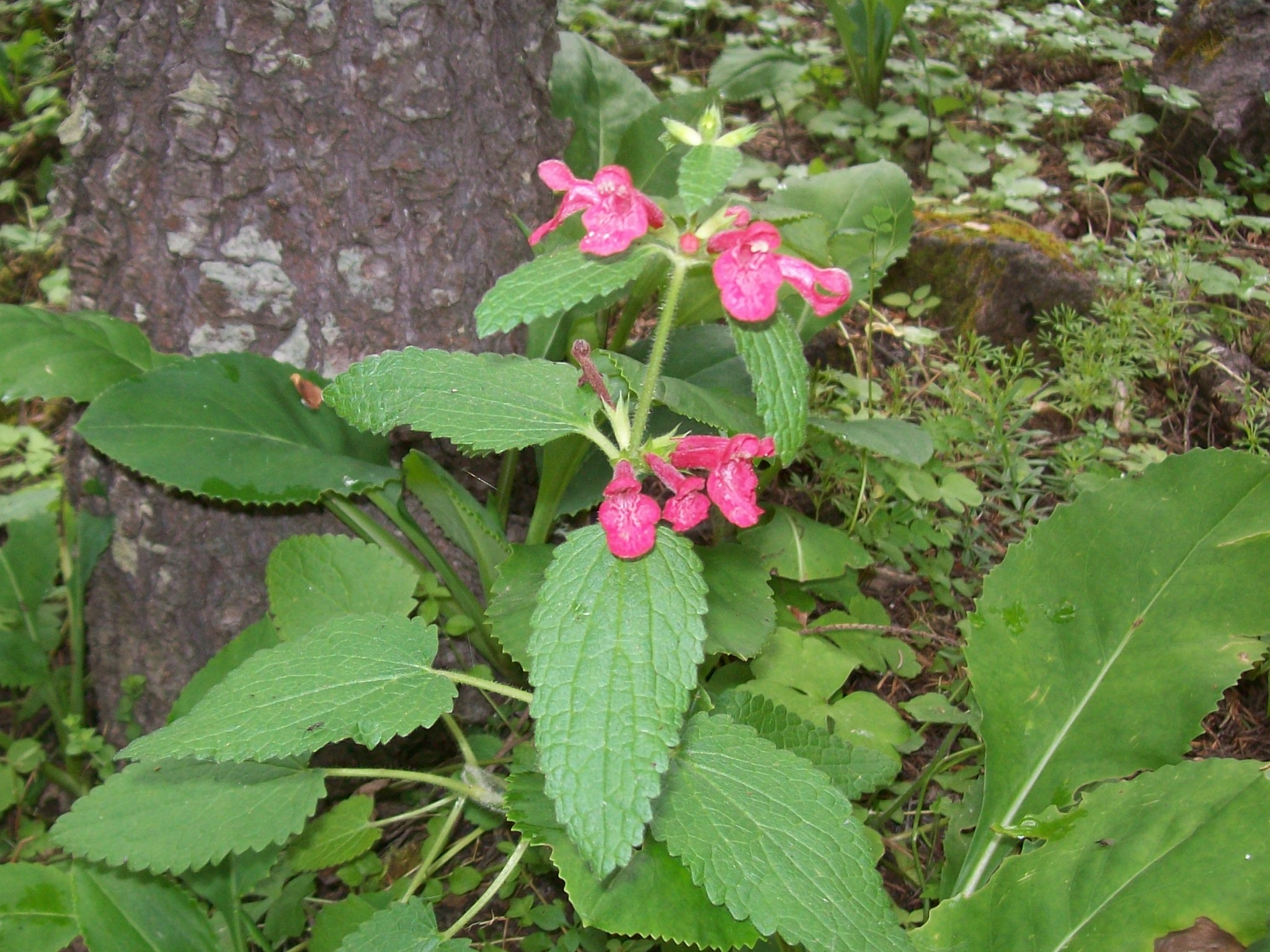 Stachys coccinea in Tamazula, Durango, Mexico